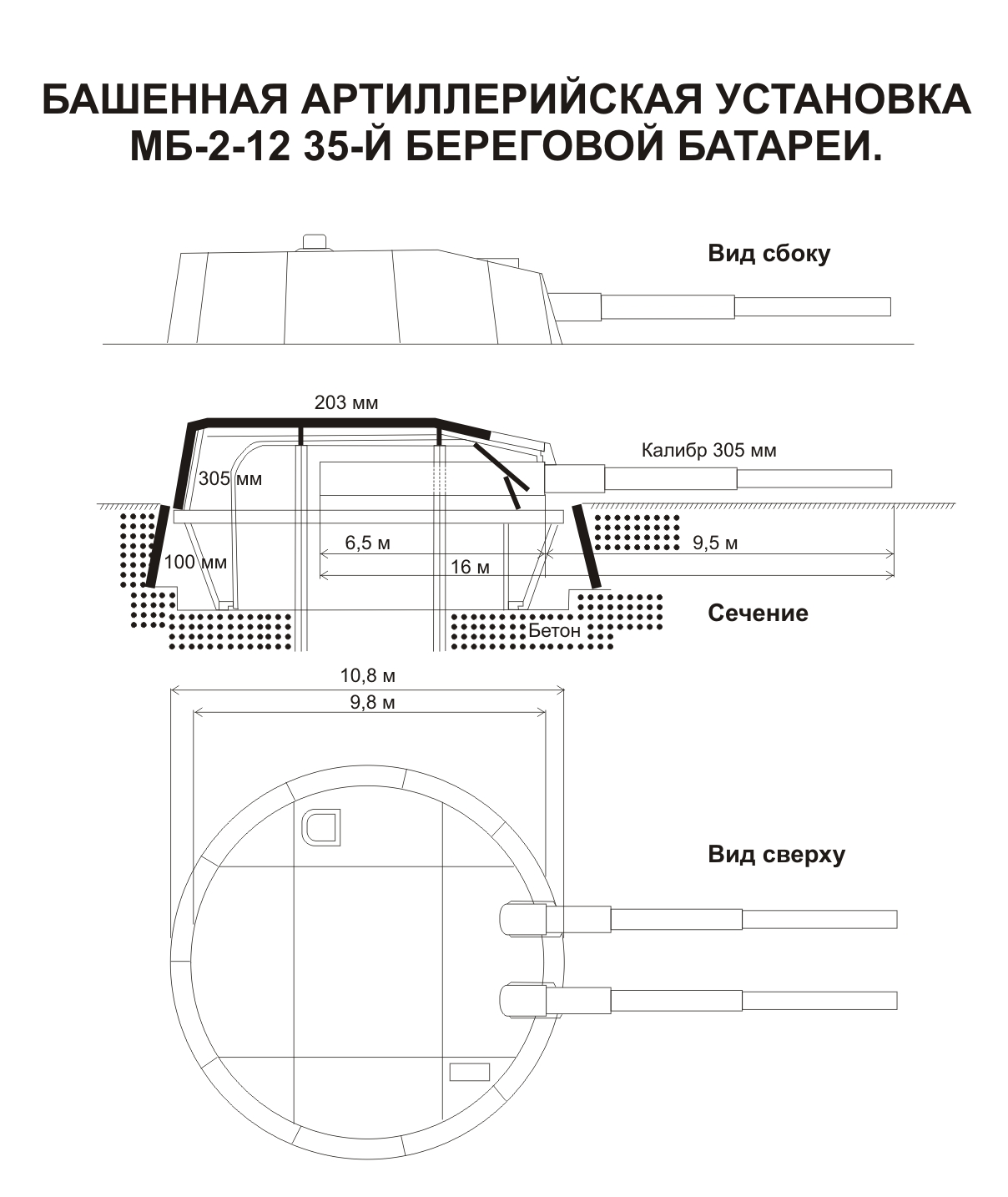 Схема бронебашни МБ-2-12